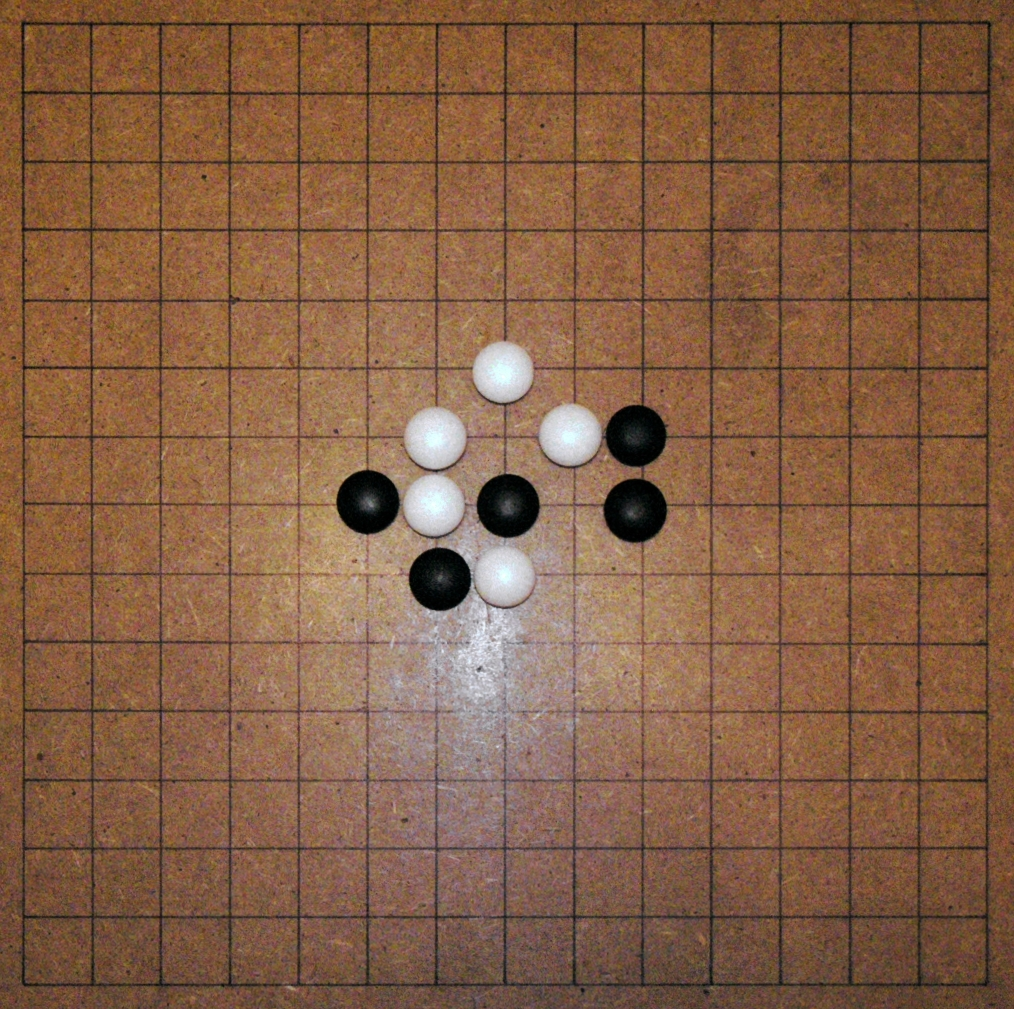 Renju